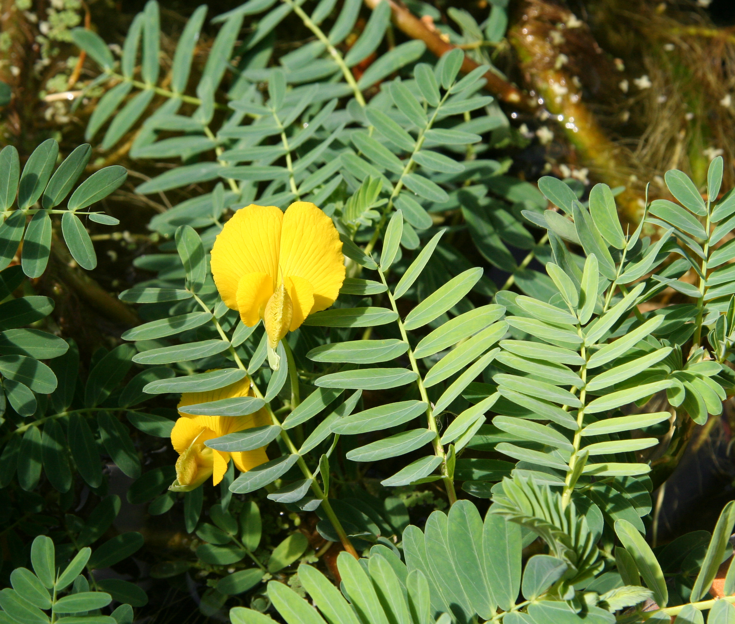 Aeschynomene fluitans im Botanischen Garten Dresden